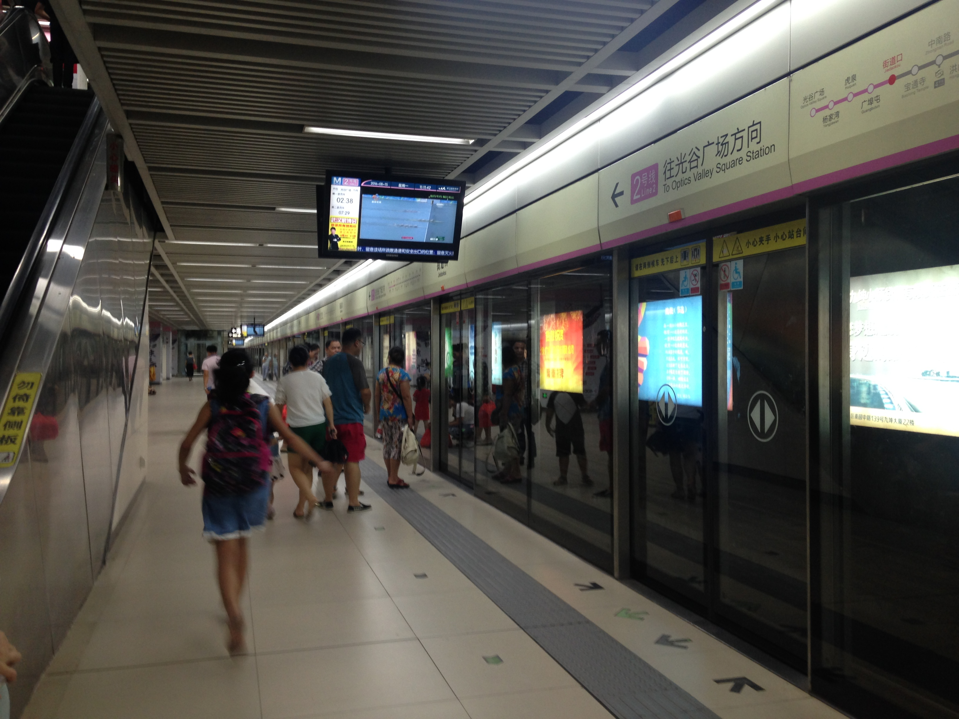 街道口駅のホーム